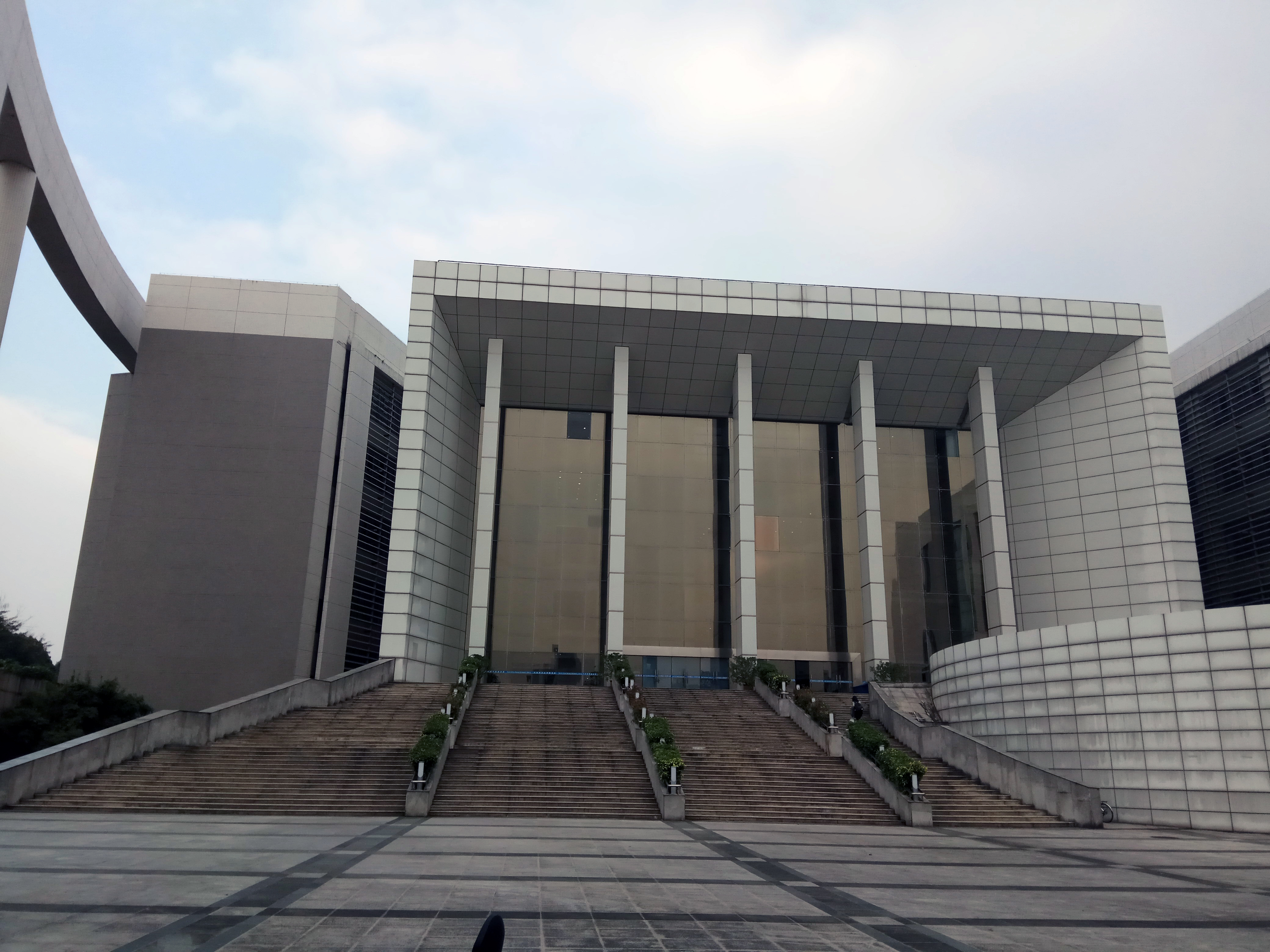 中文（中国大陆）: 华南师范大学大学城校区图书馆